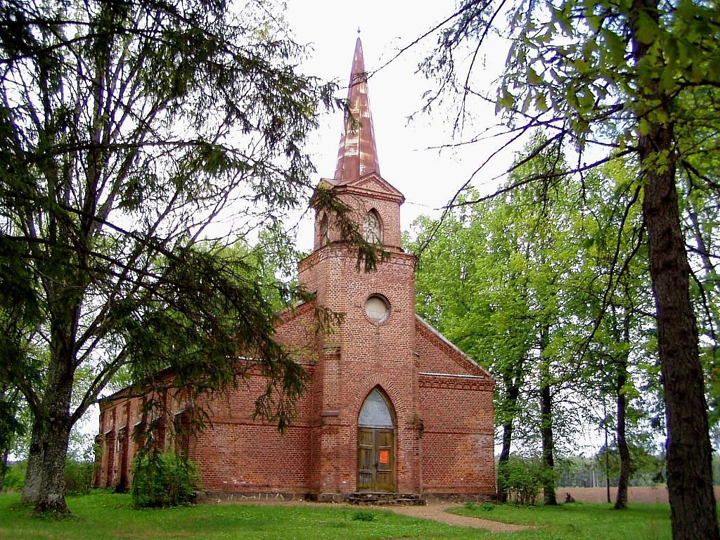 Piksāru baznīca 2006-05-20